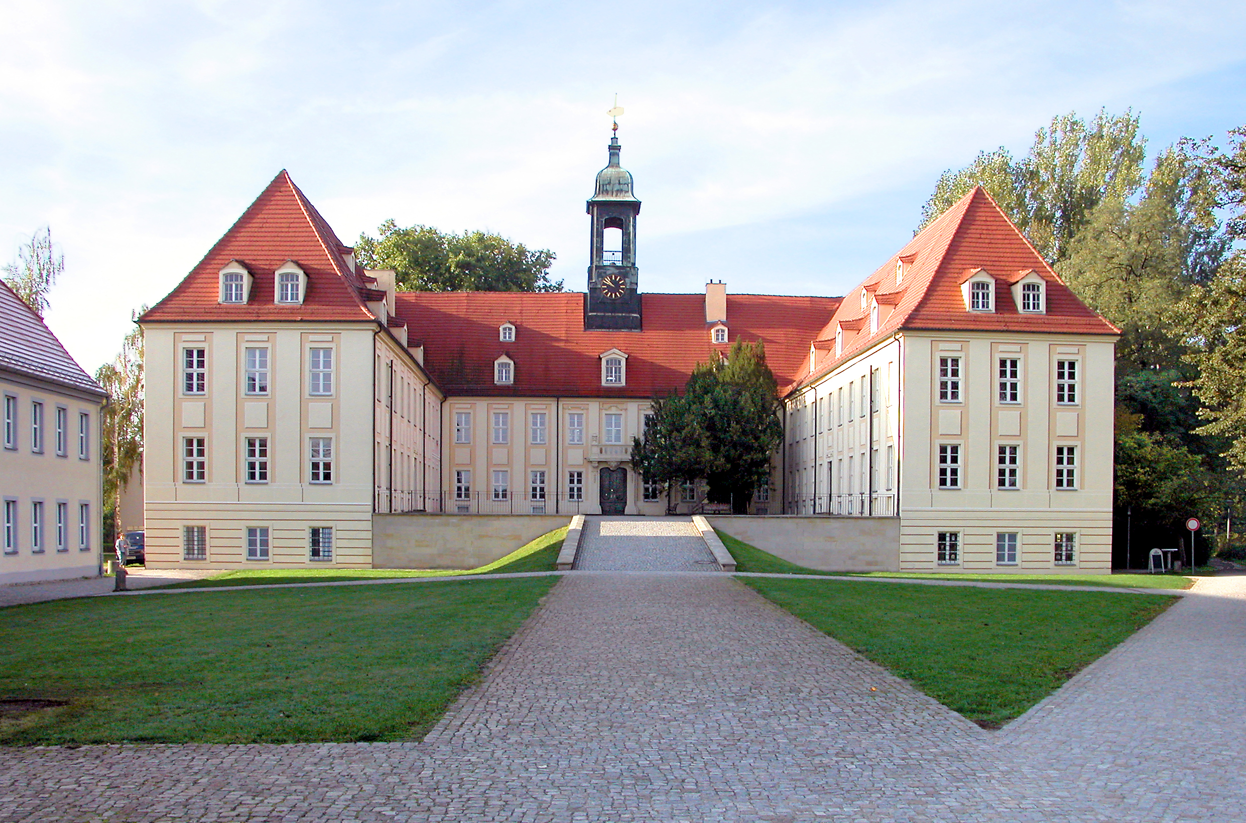 18.10.2006 04910 Elsterwerda, Schloßplatz (GMP: 51.454146,13.523496): Elsterschloß, barocke Dreiflügelanlage. 1288 wurde erstmals eine Burg zu Elsterwerda erwähnt. 1712 baut Woldemar Freiher von Löwendal die Burg zum Schloß um und übernahm sich dabei. 1727 ersteigerte es August der Starke, König von Polen und Kurfürst von Sachsen. Der Baumeister Johann Christoph Knöffel verwandelte den Adelssitz 1735 bis 1737 in ein kurfürstliches Jagd- und Lustschloß. 1815 fiel Elsterwerda an das Königreich Preußen. Aus dem im Schloß eingerichteten Lehrerseminar ging später eine Schule hervor, heute Gymnasium. Blick von Norden. [DSCN12108.TIF]20061018030DR.JPG(c)Blobelt